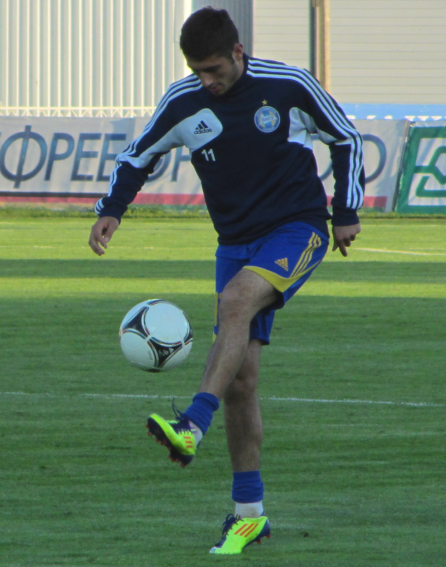 Игрок ФК БАТЭ (Борисов, Беларусь) армянин Завен Бадоян